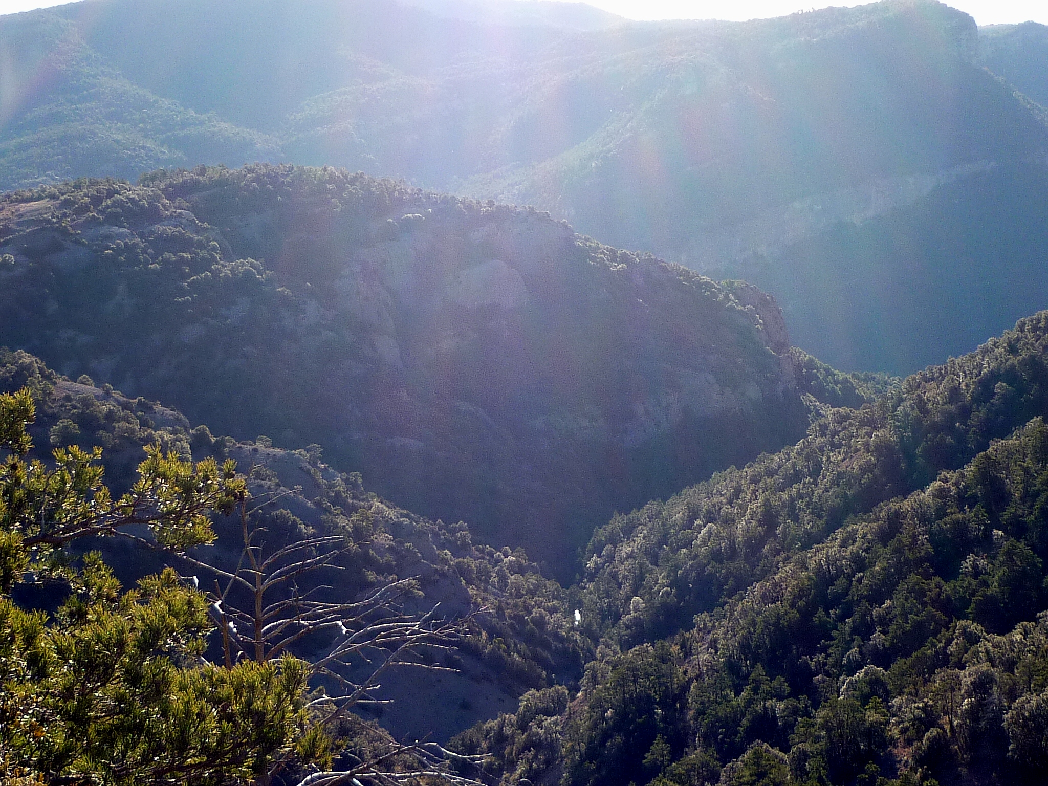 Capçalera de la Rasa de Capdevila des del seu inici, sota la Ventolada. Al fons la vall del Cardener. Municipis de Lladurs i Navès (Solsonès - Catalunya)